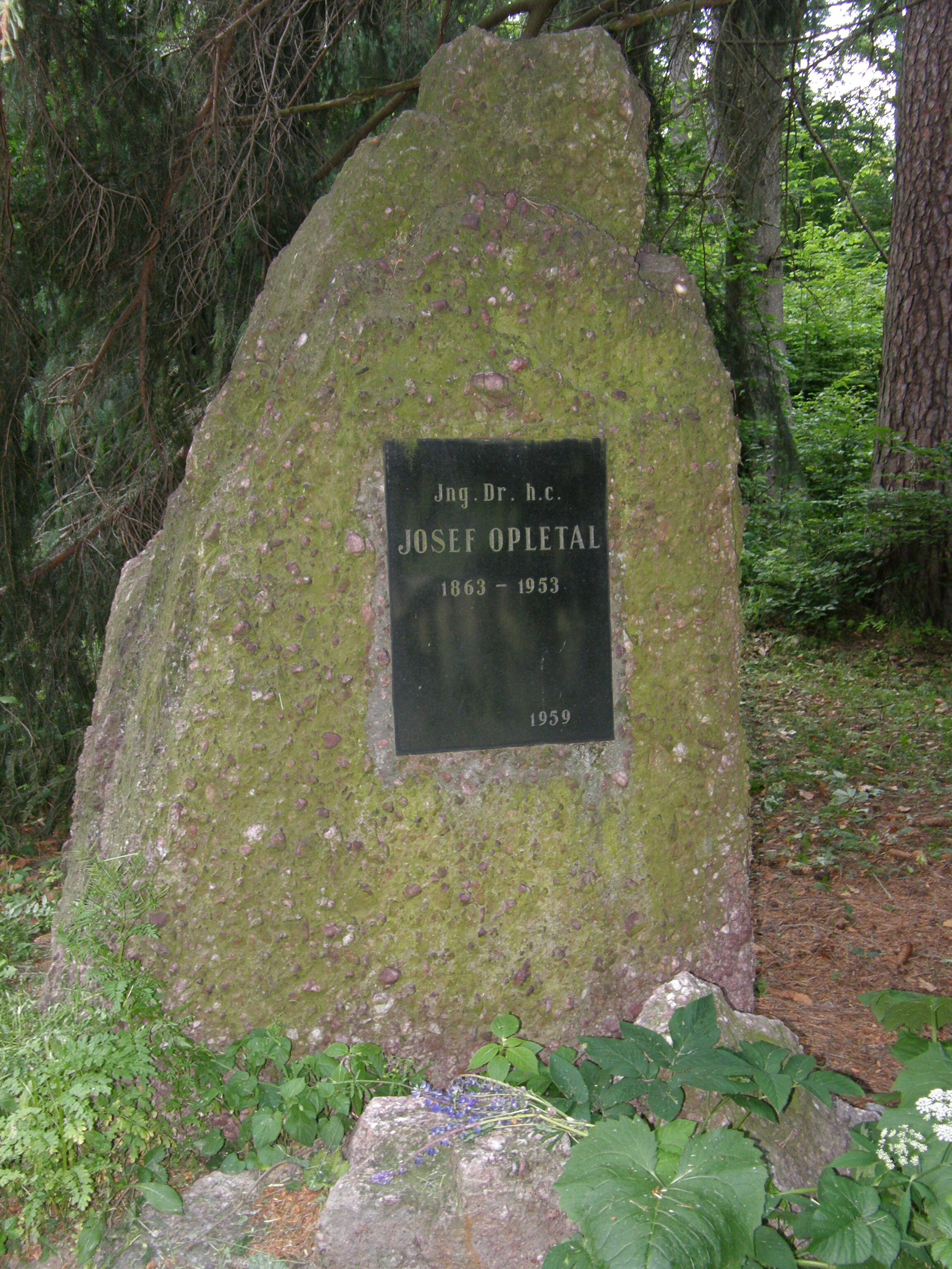 Pomník Josefa Opletala u Křtin